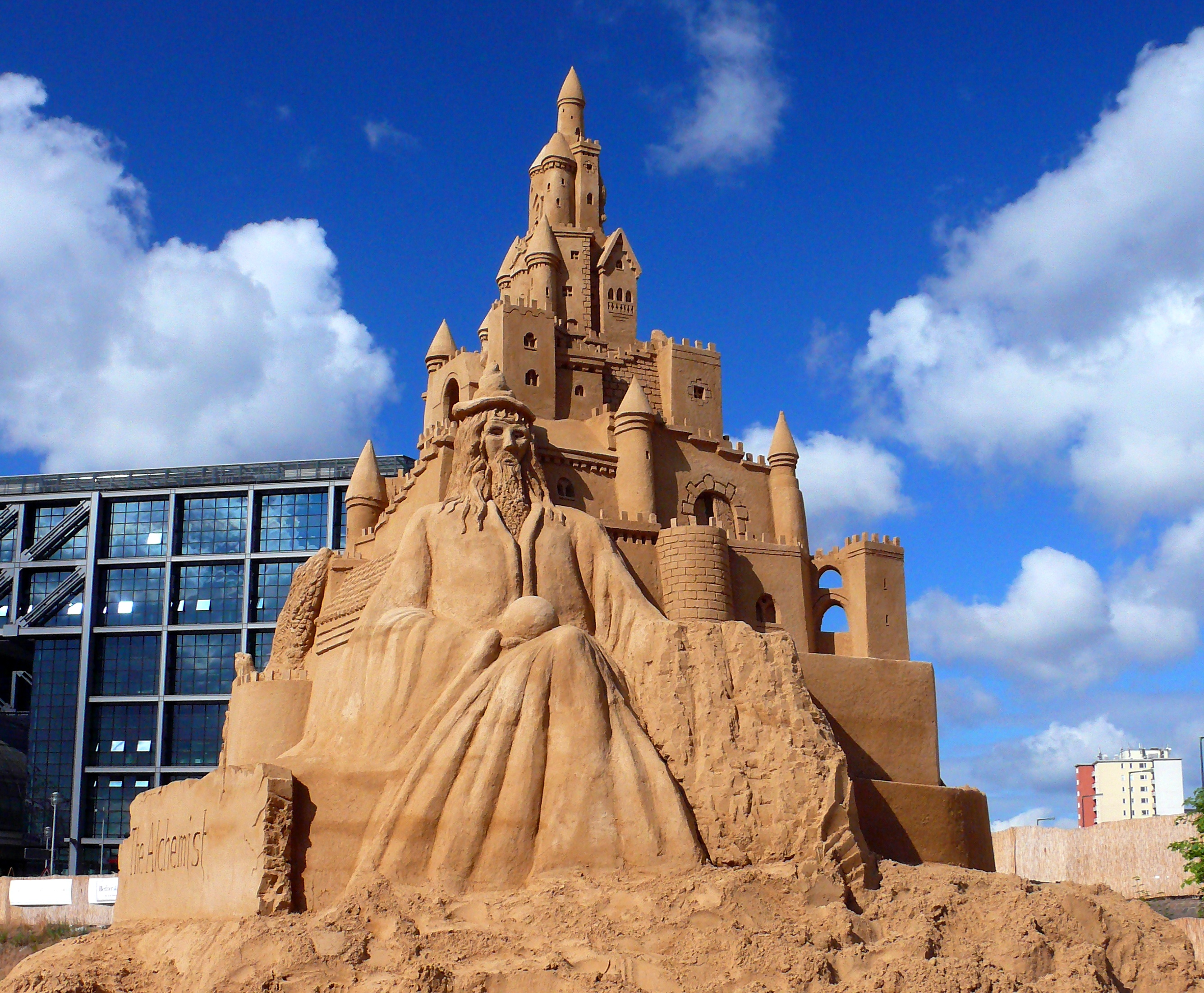 opera realizzata dal team italiano "sandytales" a Berlino al "Sandsation 2008"